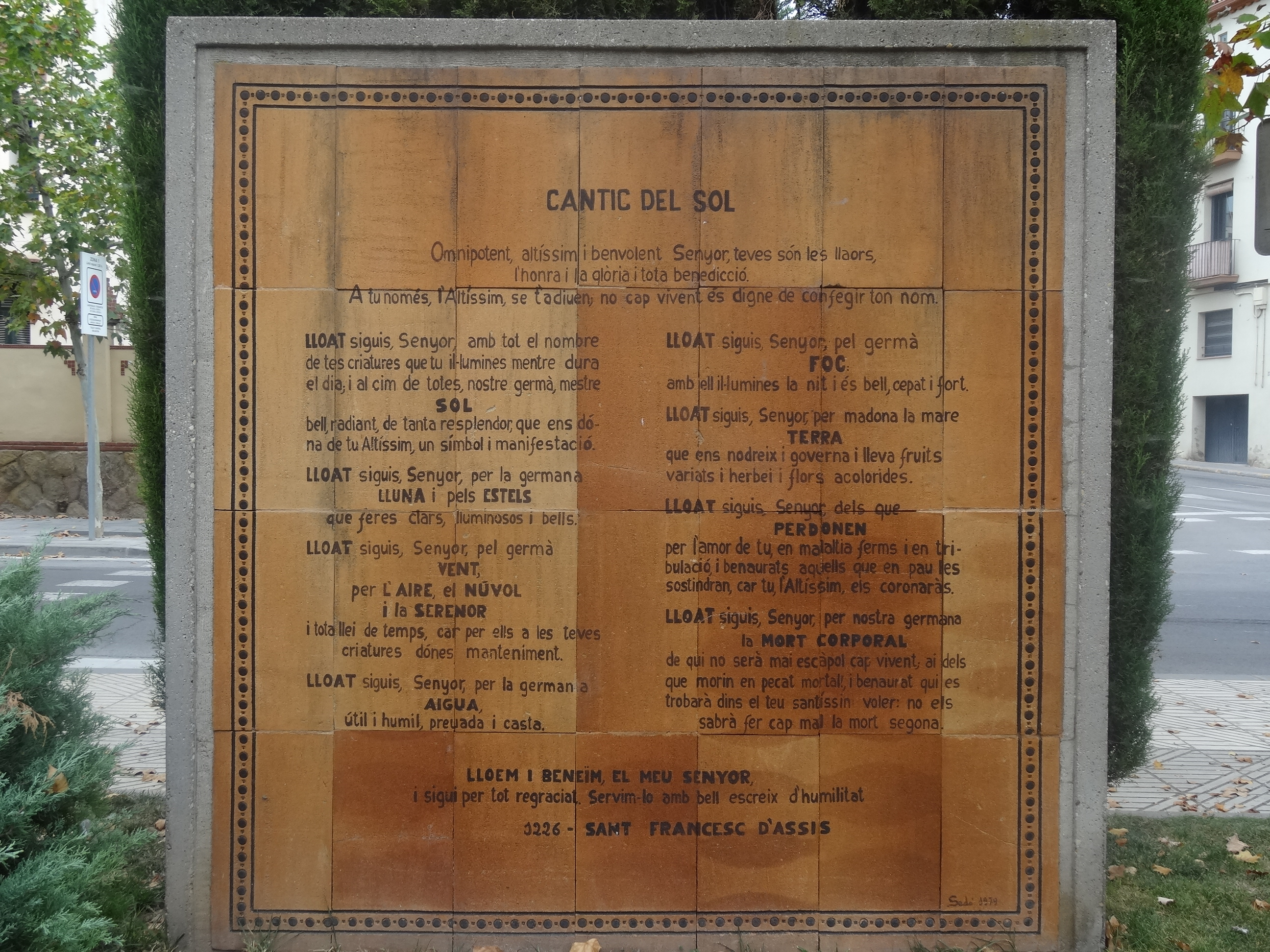 Cantic del Sol (Laudes Creaturarum) - Sant Francesc d'Assís - Ceràmiques Sedó (1979). Passeig de Mossèn Jacint Verdaguer (Igualada).